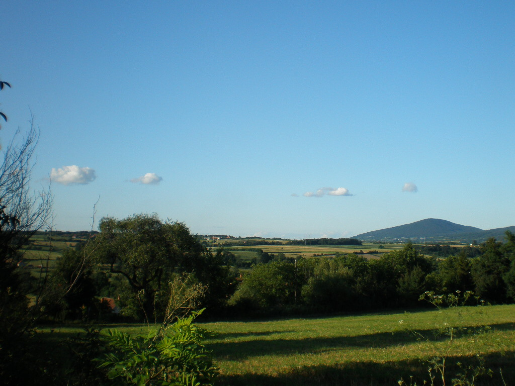 Поглед на планину Космај, село Венчани